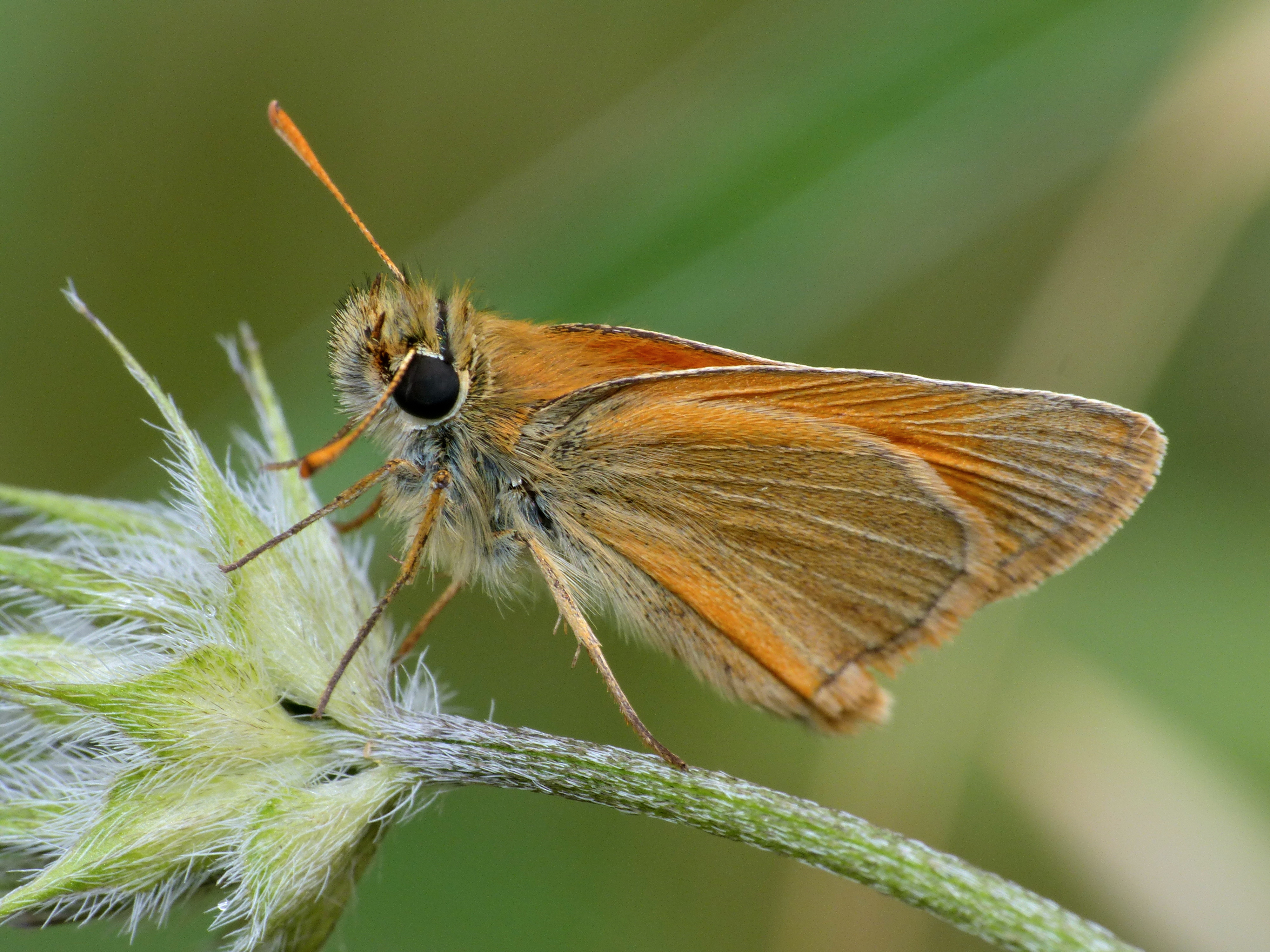 Tanarrio, Camaleño, Cantabria, SPAIN